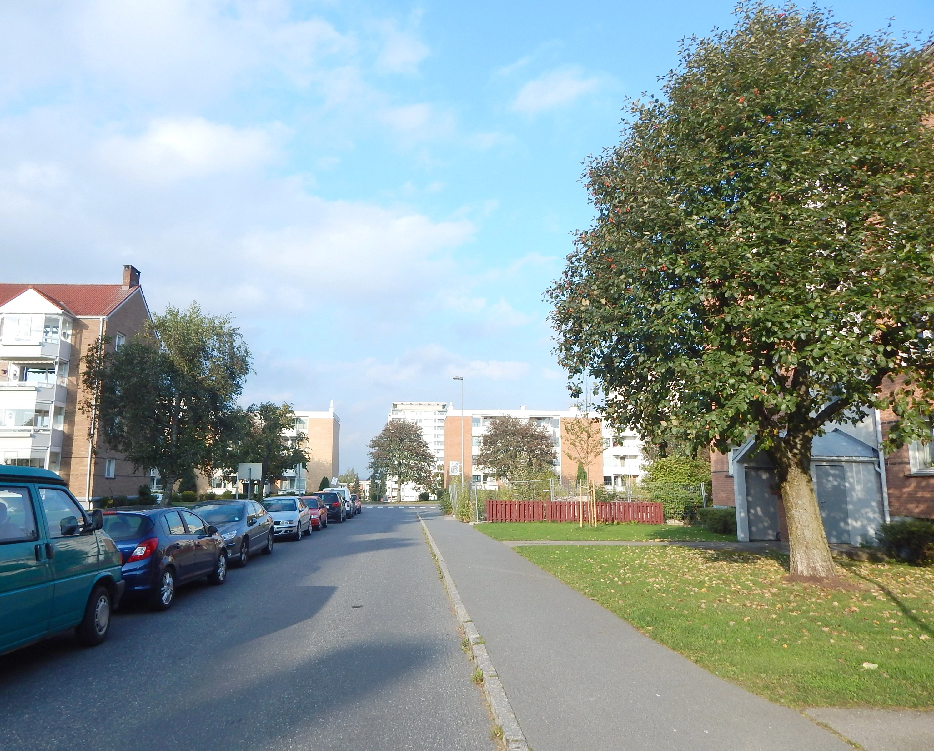 Våronnveien mot Plogveien